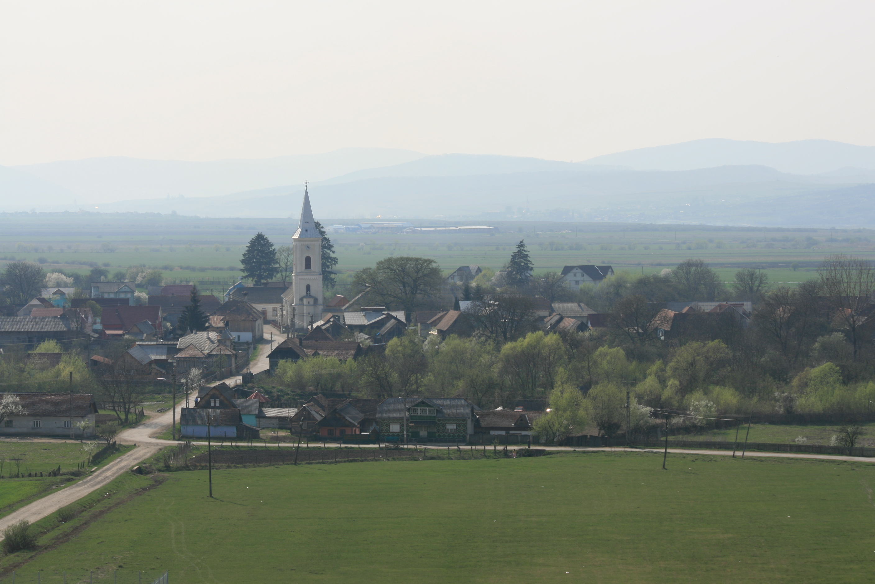 Orheiu (Burghalle) village, Bistrița-Năsăud county, Romania